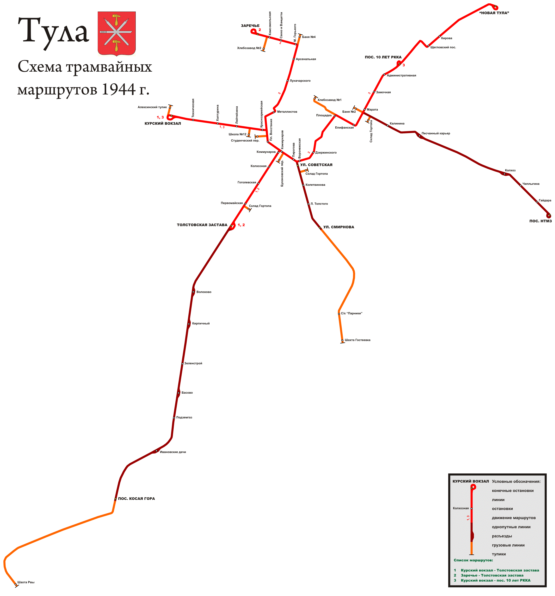 Схема тульского трамвая в 1944 году